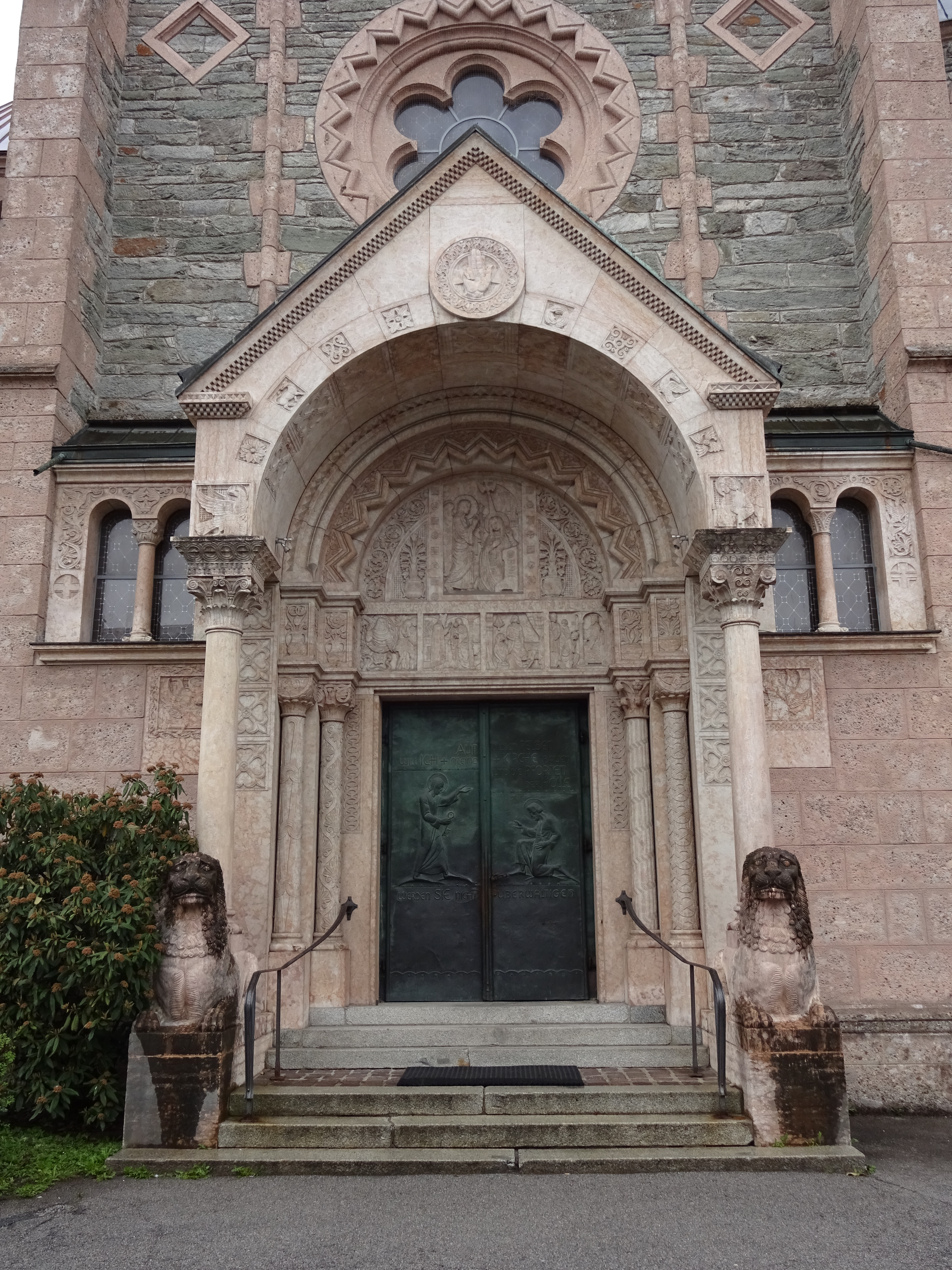 Pfarrkirche Pradl: Hauptportal This media shows the remarkable cultural object in the Austrian state of Tyrol listed by the Tyrolean Art Cadastre with the ID 16406. (on tirisMaps, pdf, more images on Commons, Wikidata)